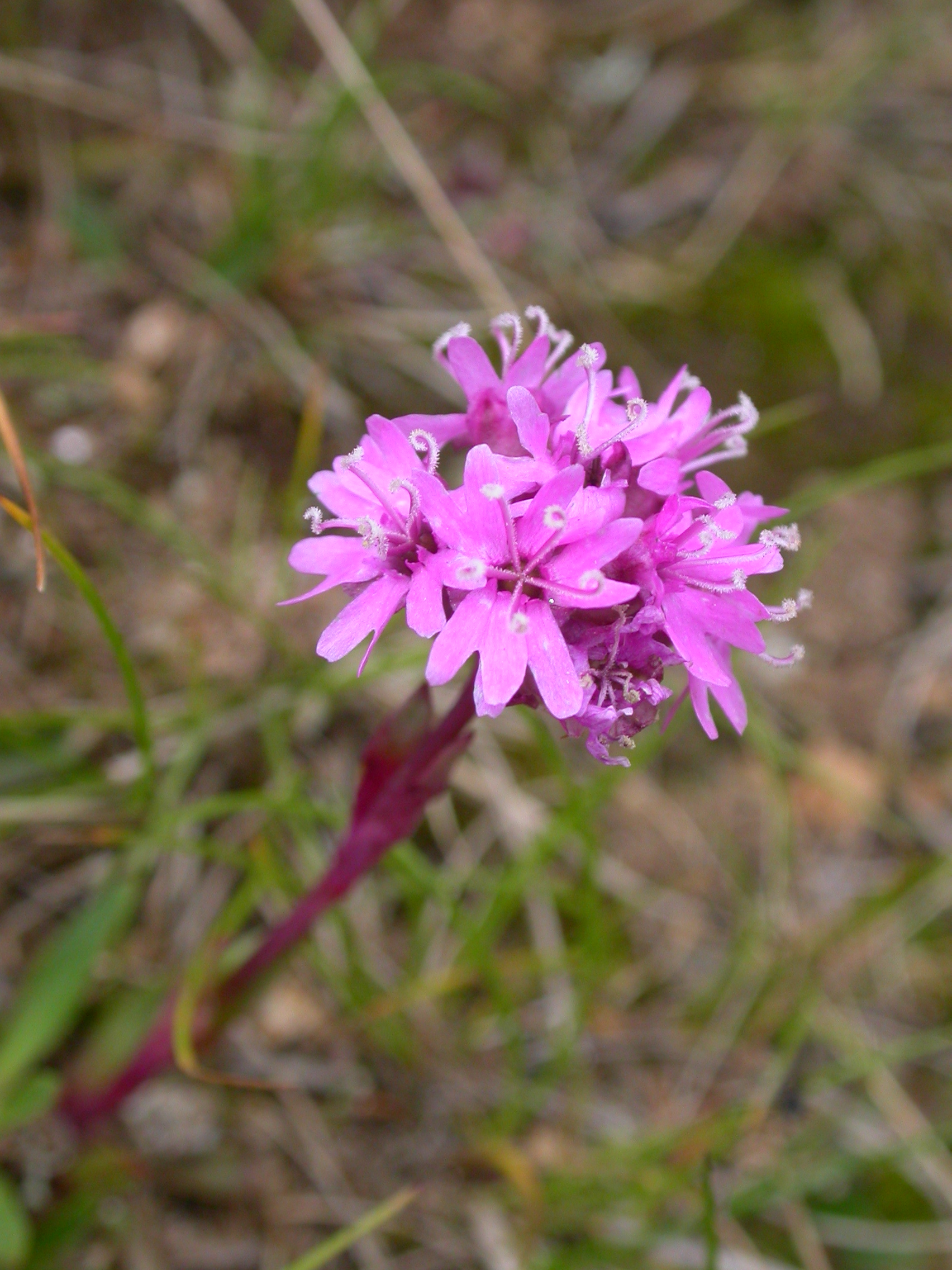 Silene suecica Zermatt, Riffelberg (Kanton Wallis, Switzerland), 2500 m Author: Barbara Studer – own photograph Date: 2.08.06